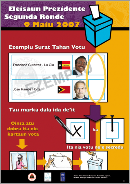 Infoplakat für die Präsidentenwahl Osttimor 2007, 2. Wahlgang